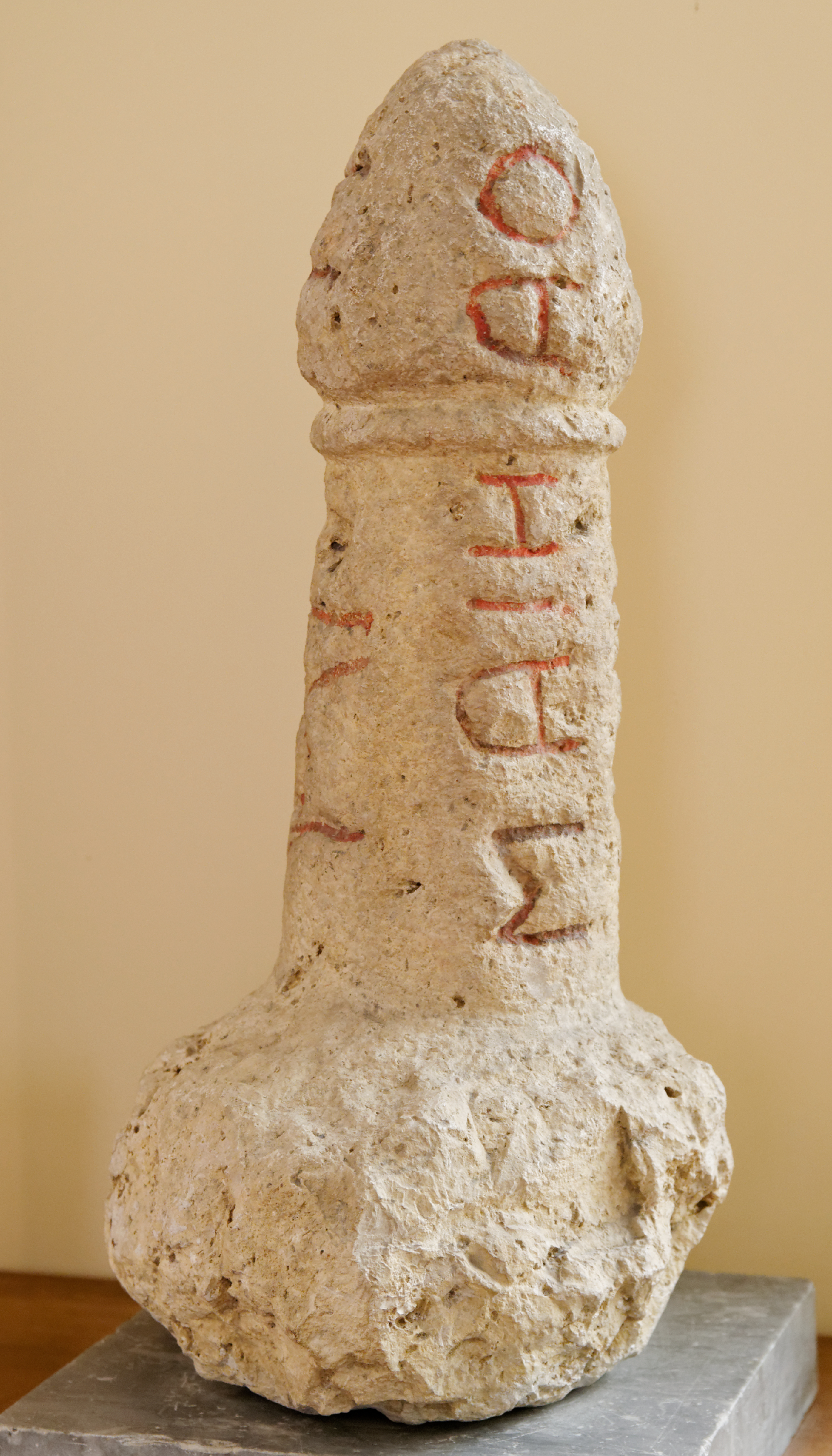 Cippo funerario etrusco in forma di fallo. Le iscrizioni etrusche attestano che proviene dall'area di Chiusi-Perugia.